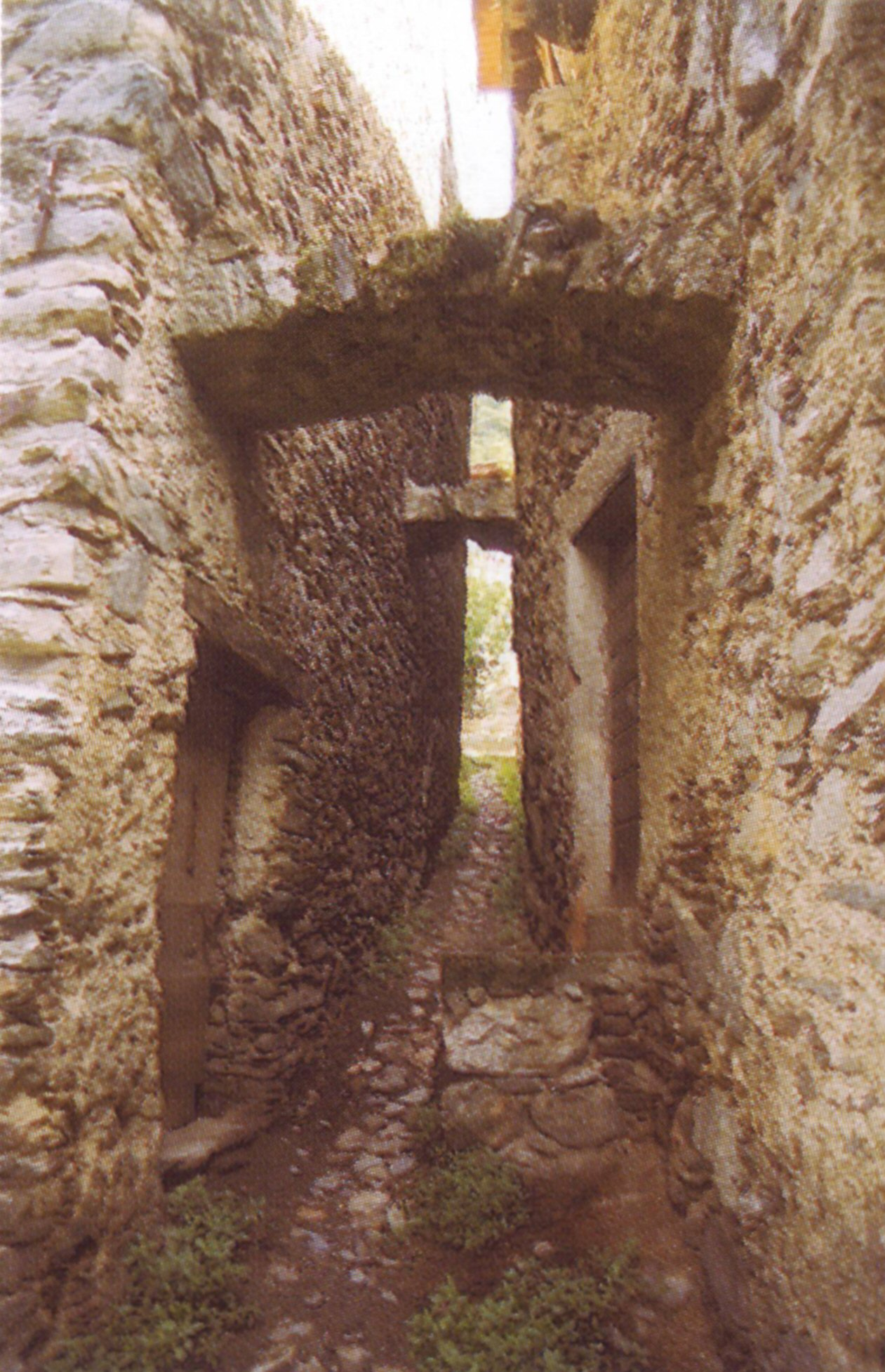 ruelle de Piedo ( Tresivio)